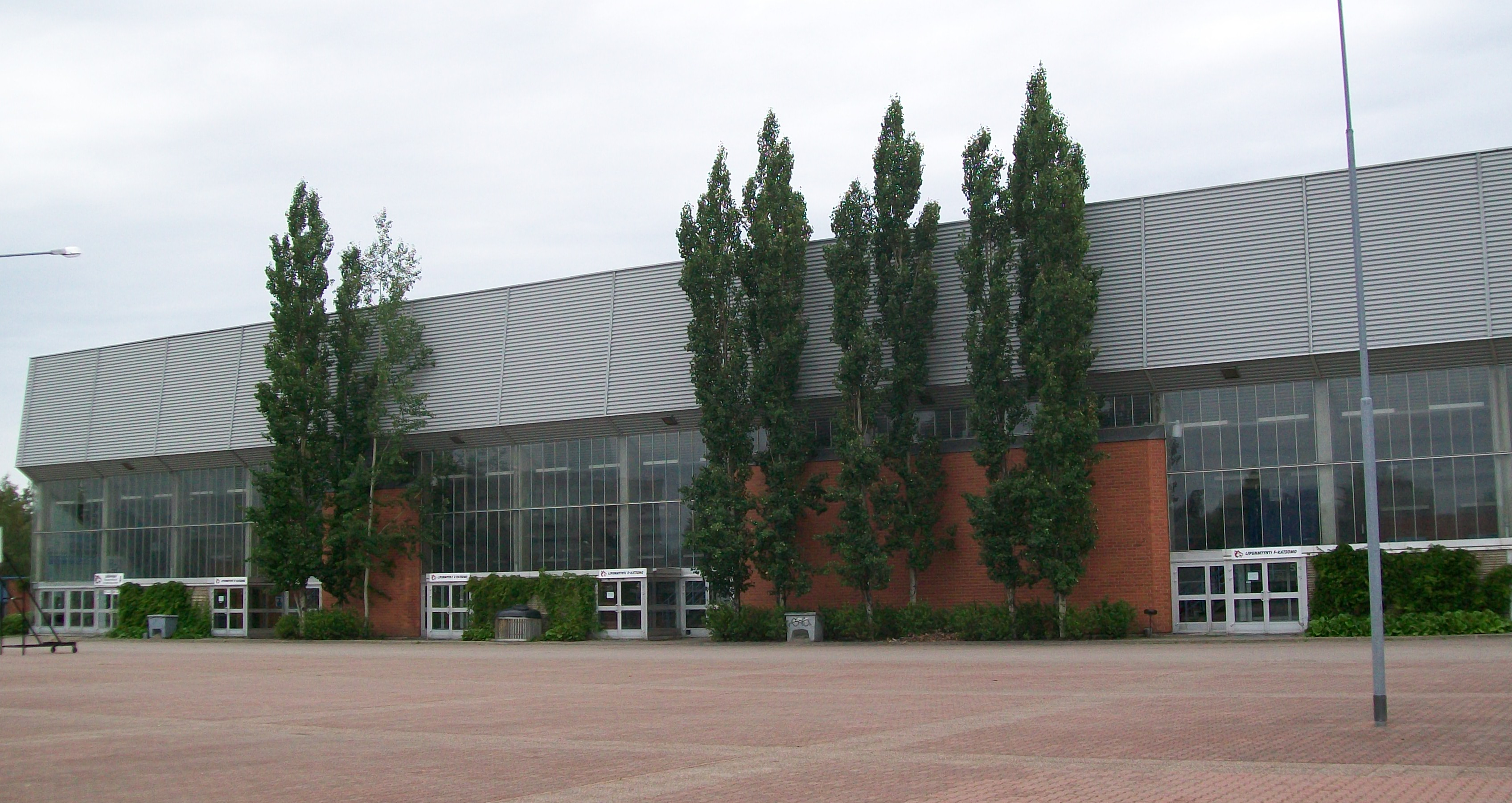 Joensuun jäähalli